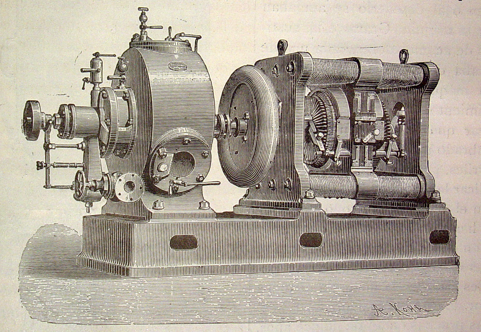 Ilustraciones de la obra : El mundo físico : gravedad, gravitación, luz, calor, electricidad, magnetismo, etc. / A. Guillemin. - Barcelona Montaner y Simón, 1882